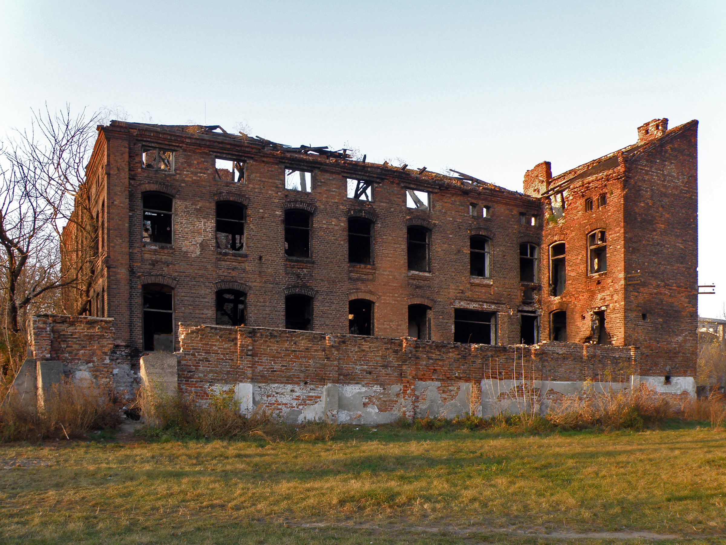 Warszawa, Praga Północ, ul. Okrzei 12, Fabryka Ślusarka Ogórkiewicza i Zagórnego (powstała ok. 1882 r.), obiekt nieużytkowany, zrujnowany.